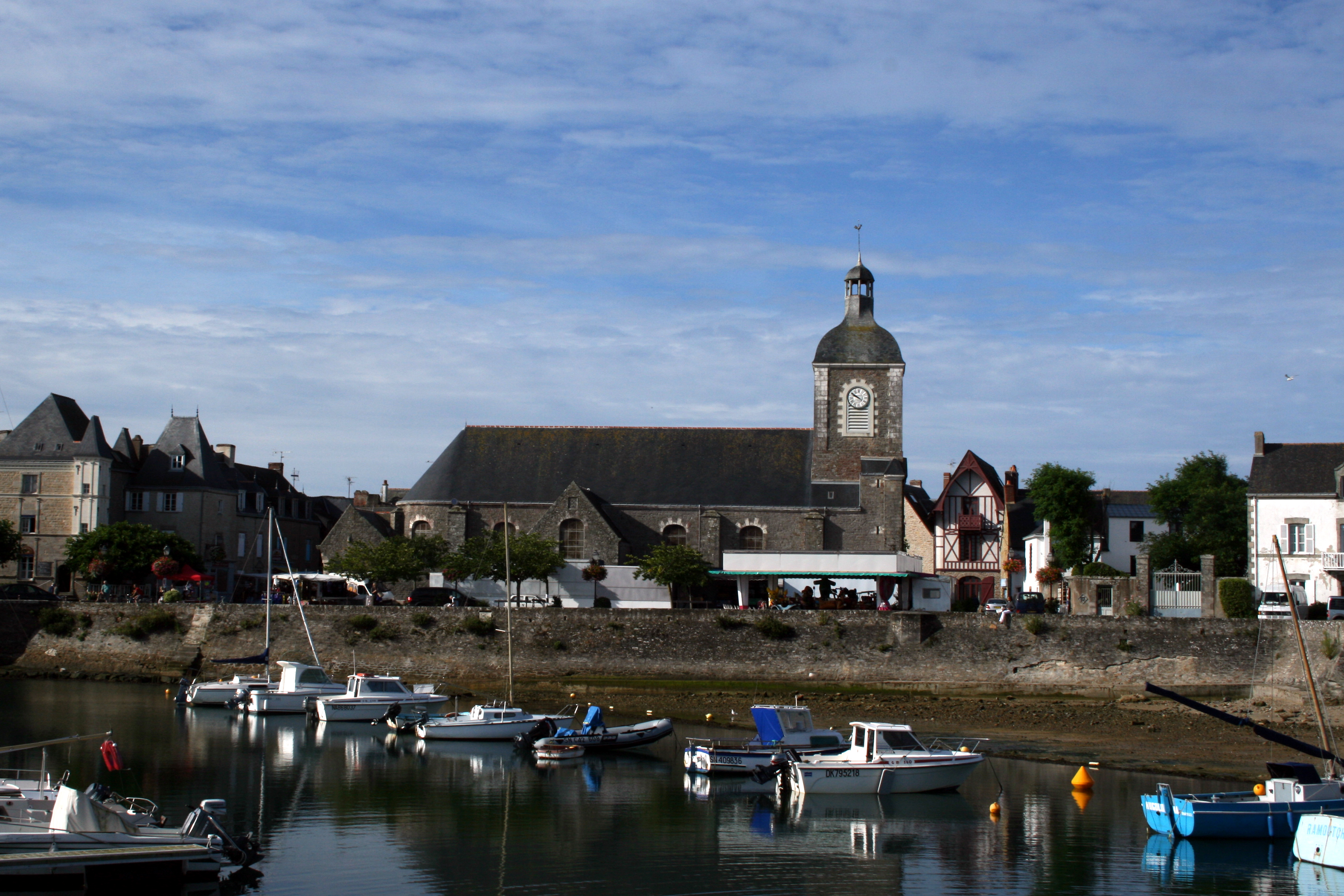 Eglise de Piriac